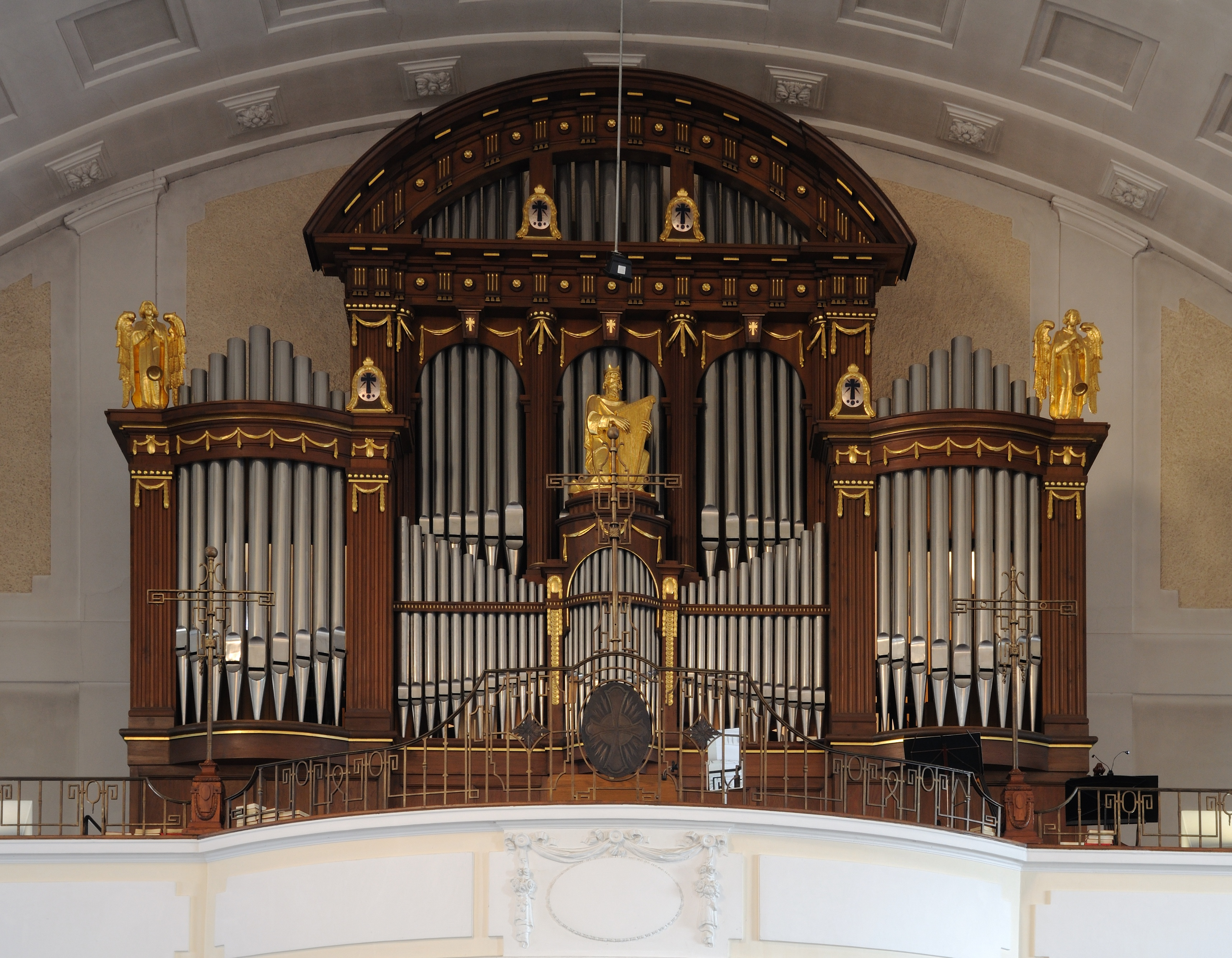 Rheinfelden: St. Josef, Orgel